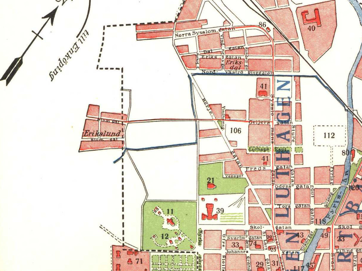 Utsnitt av karta över Uppsala 1920